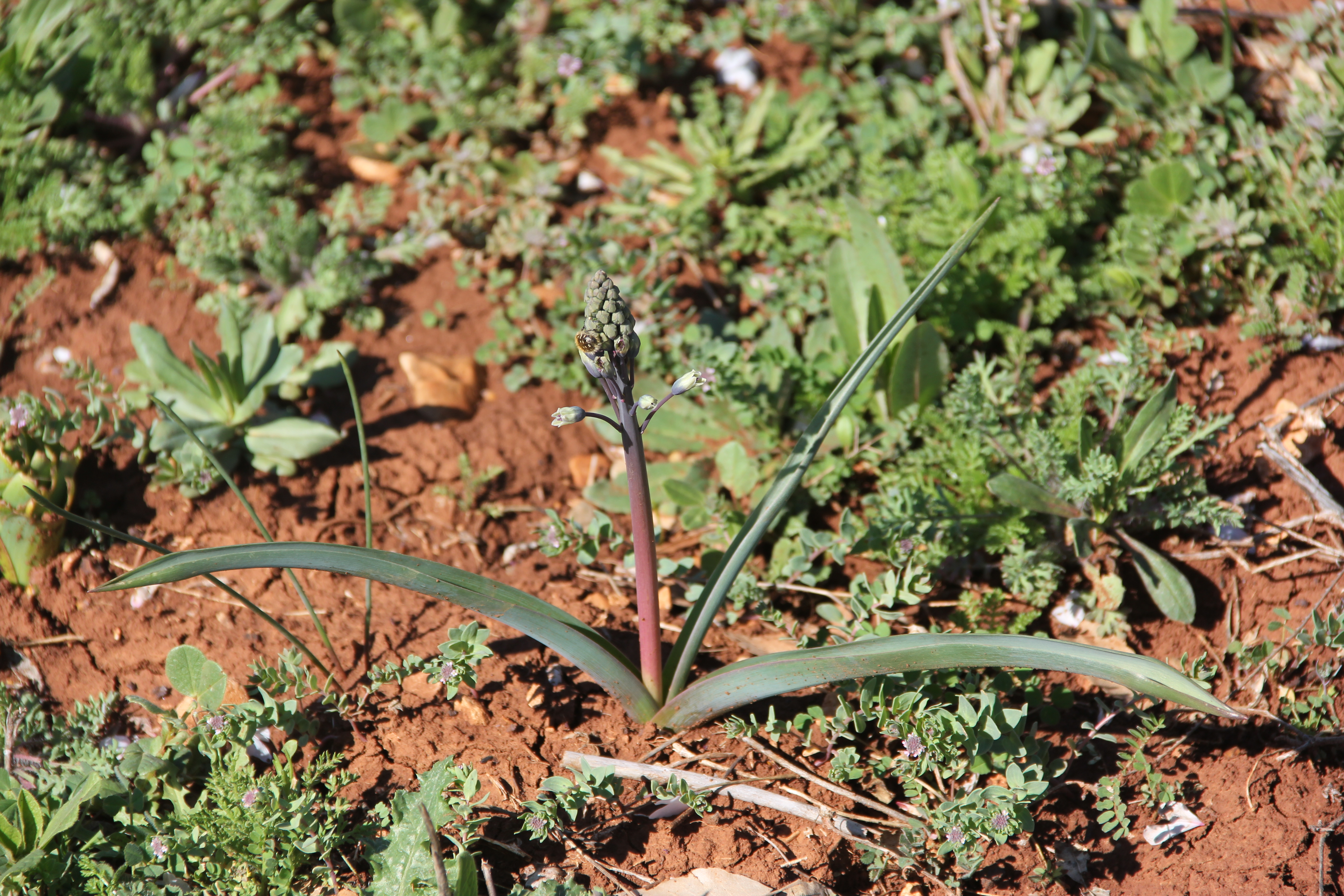 Yer: Mardin Bellevalia longipes